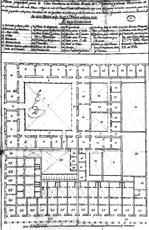 Planos de la Mansión Aycinena en la Nueva Guatemala de la Asunción en 1776.